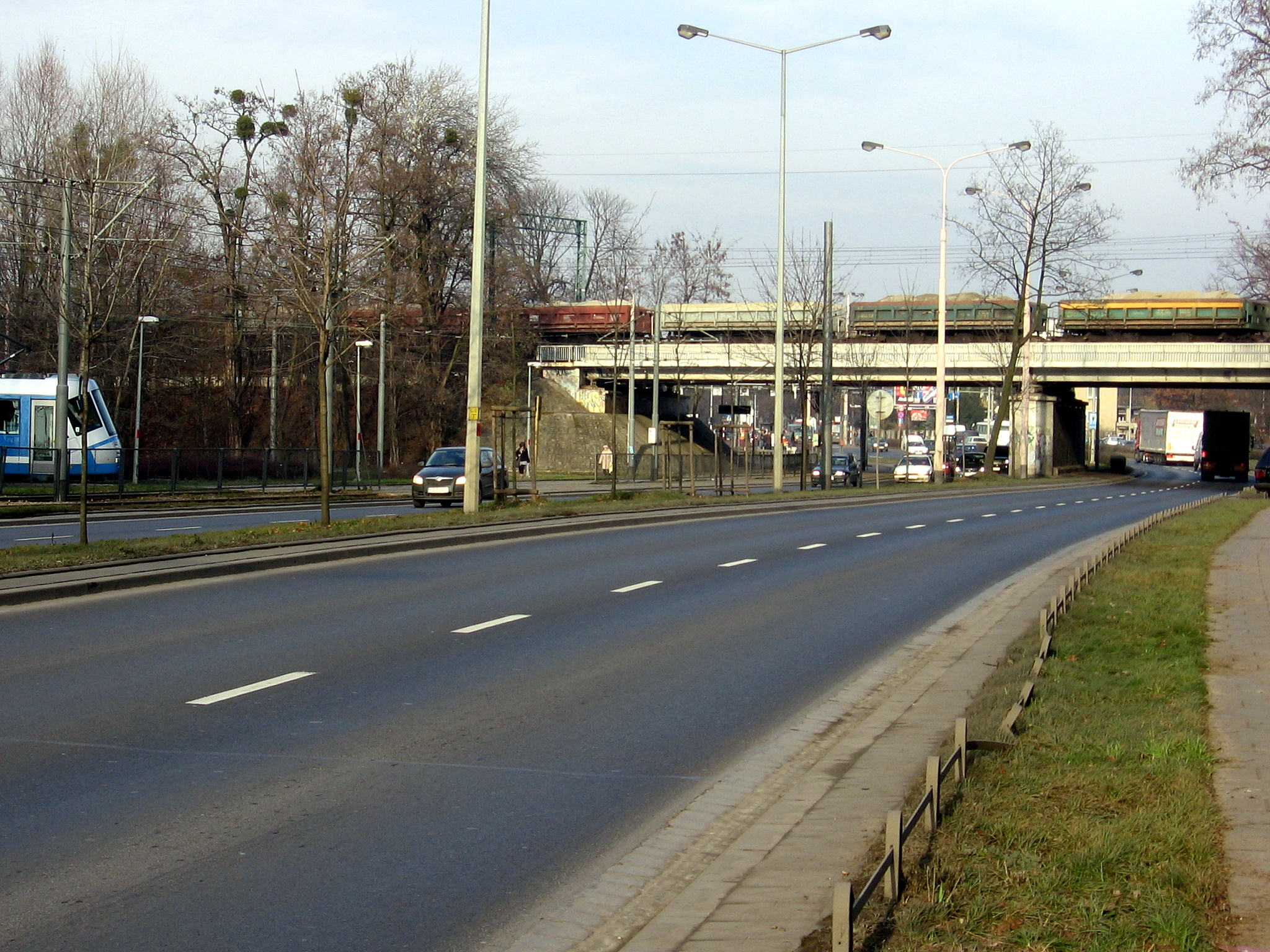 Wiadukt kolejowej obwodnicy towarowej nad ulicą Karkonoską we Wrocławiu.